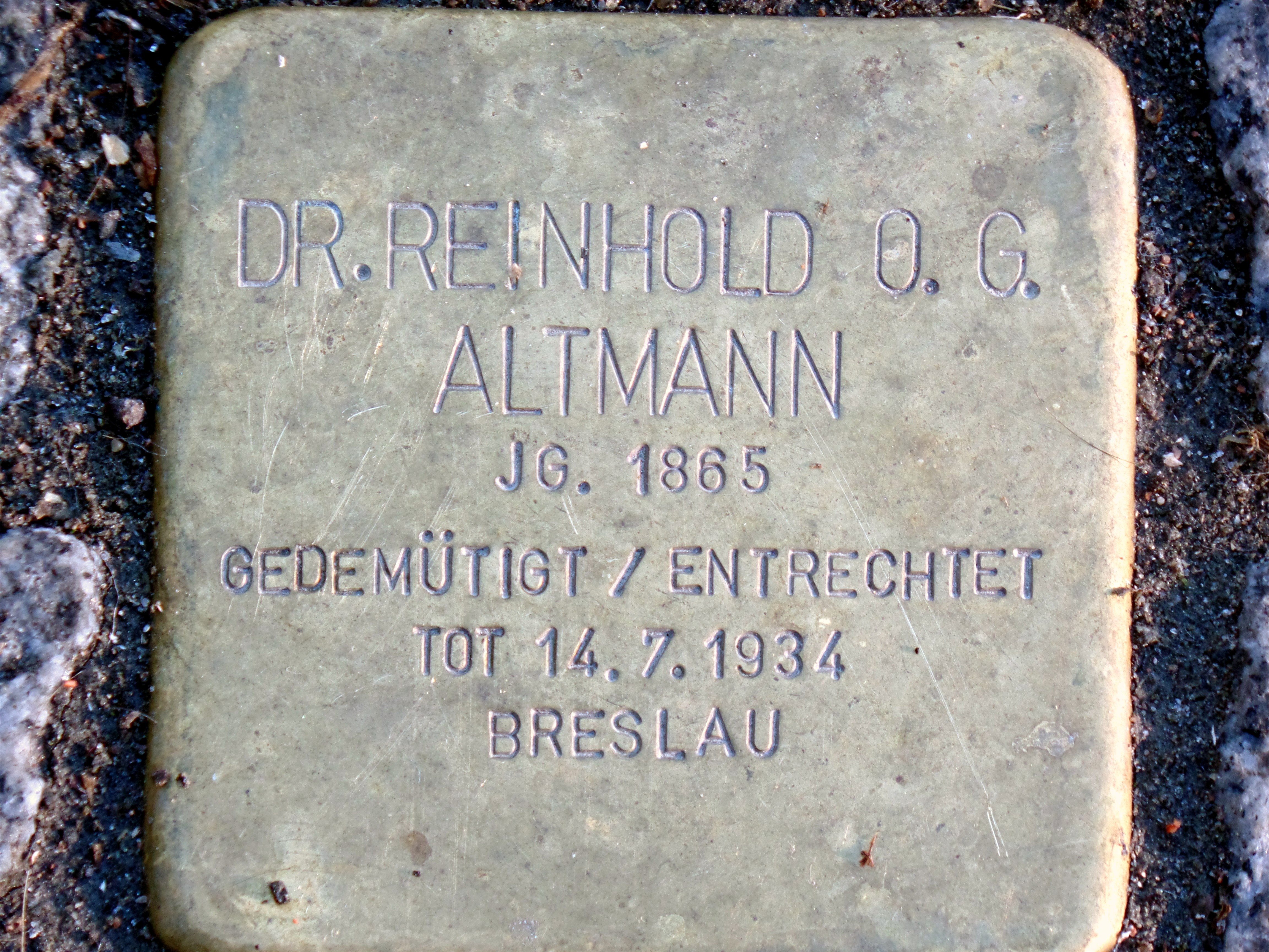 Stolperstein für Reinhold Altmann (Bruder von Wilhelm Altmann) in Leipzig, Liebigstraße 20